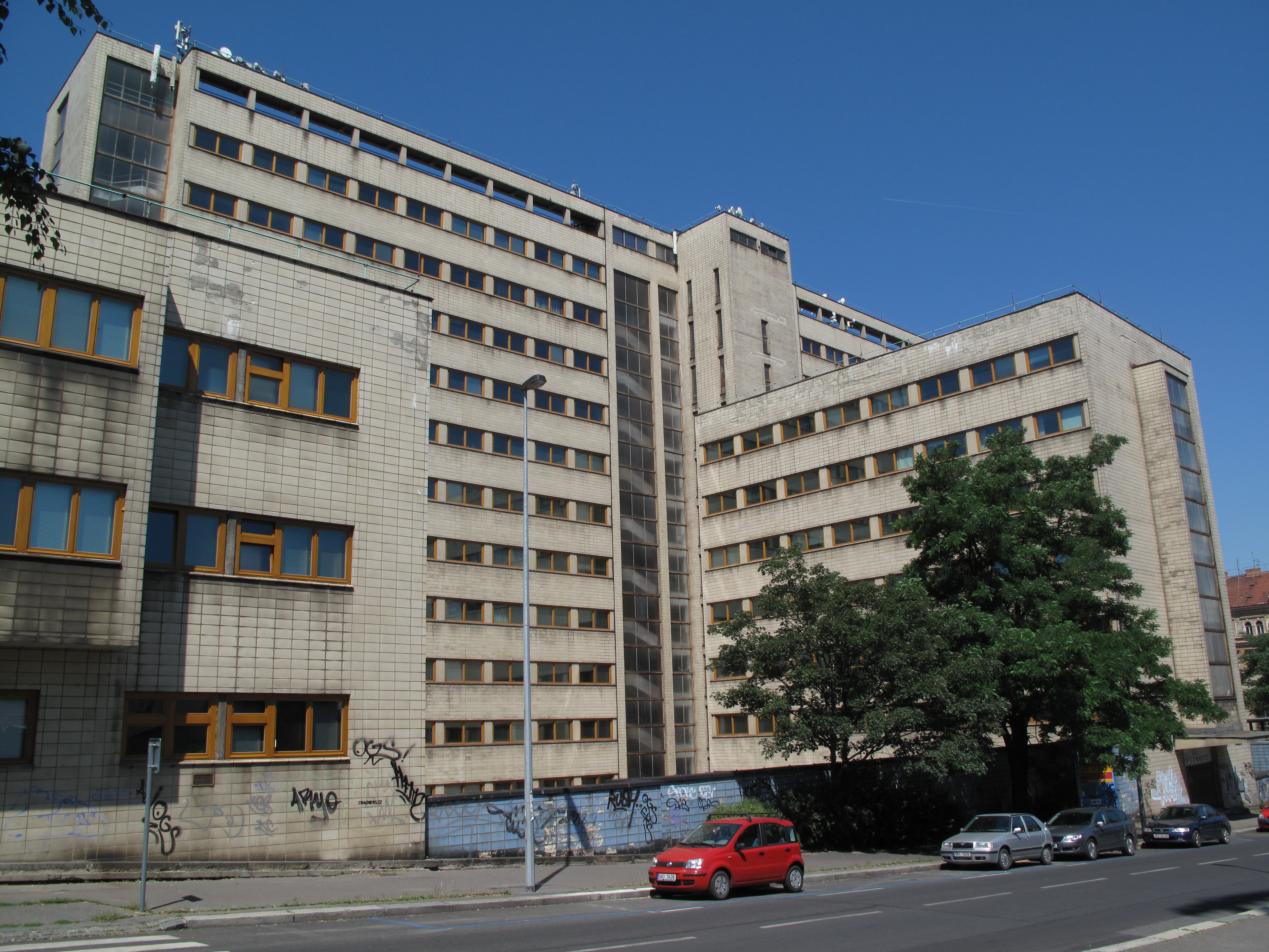 Česky: Dům odborových svazů